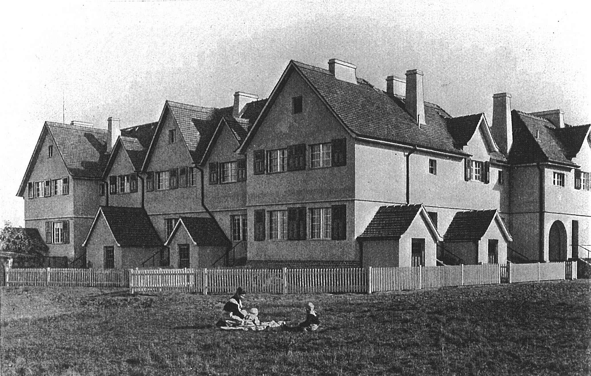 Berlin-Altglienicke, Preußensiedlung: Gartenseite von Häusern im 2. Bauabschnitt.